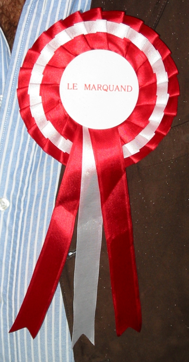 Nrf: Êlections au mais d'Octobre 2008, Jèrri